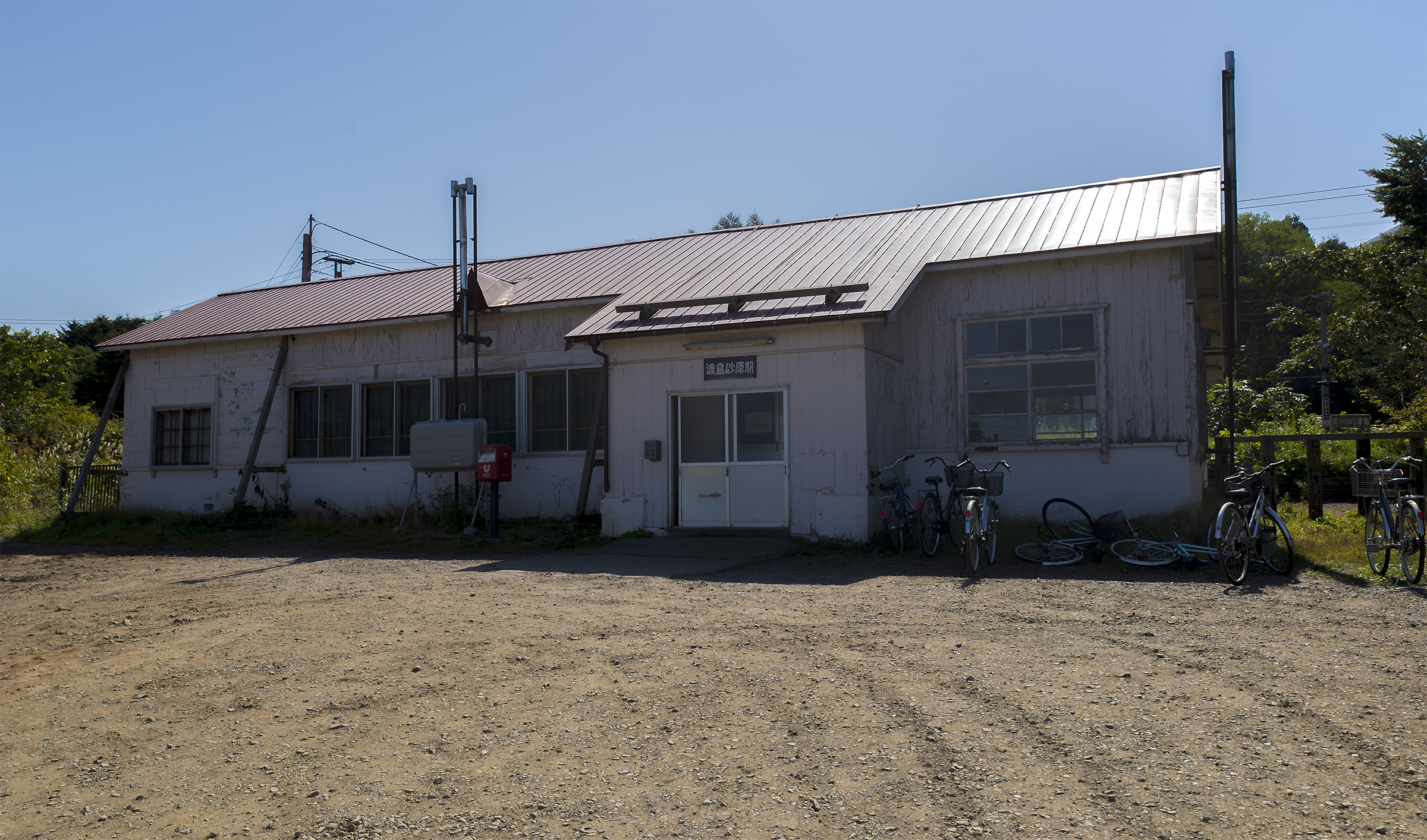 北海道旅客鉄道函館本線渡島砂原駅駅舎全景